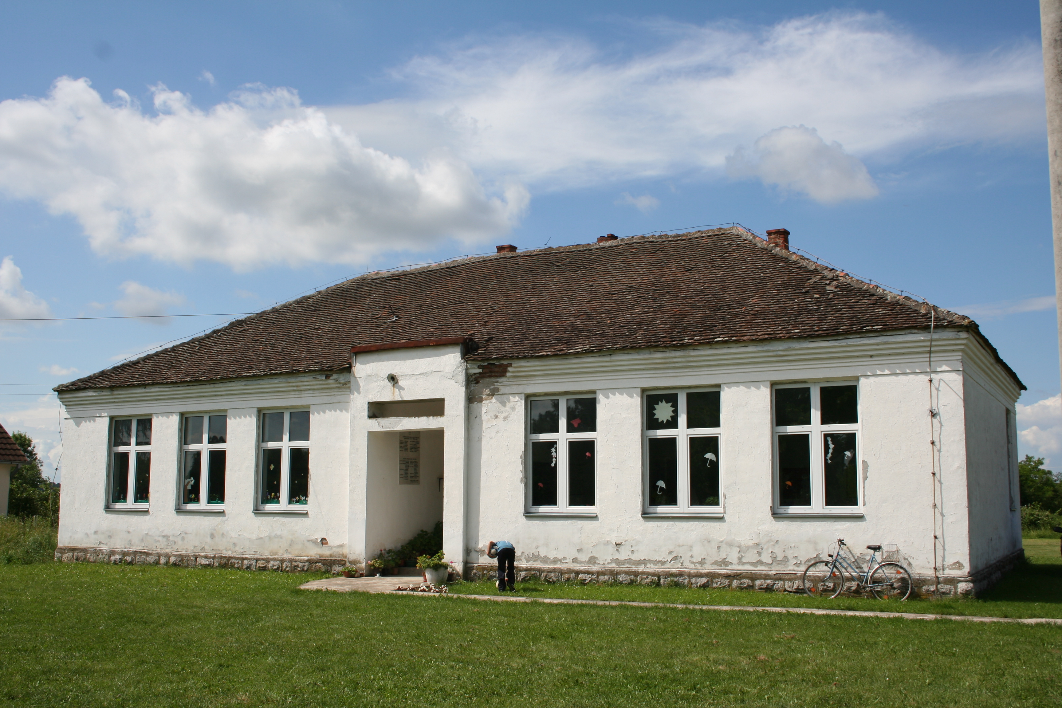 Seoska škola, Suvo Selo opština Vladimirci